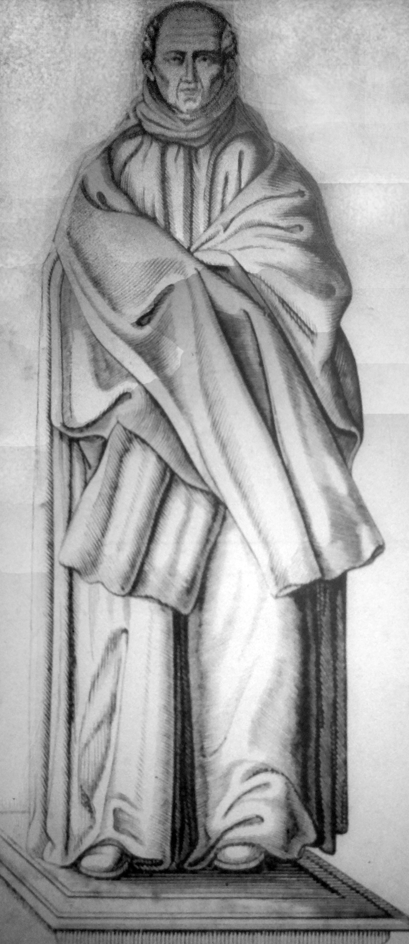 cf le titre.